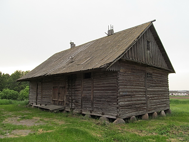 Лапухова. Свіран